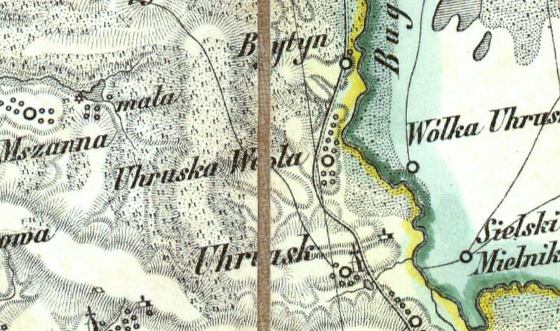 Wola Uhruska (Ziemia chełmska) na mapie Reymanna (XIX w.)